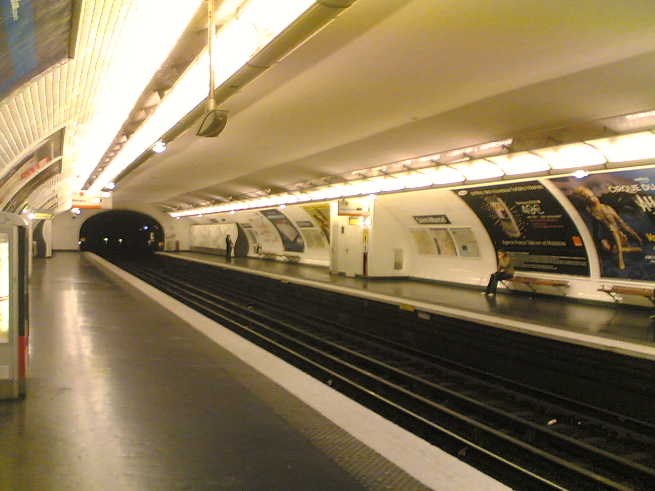 Station de métro Saint-Marcel, les quais, Paris